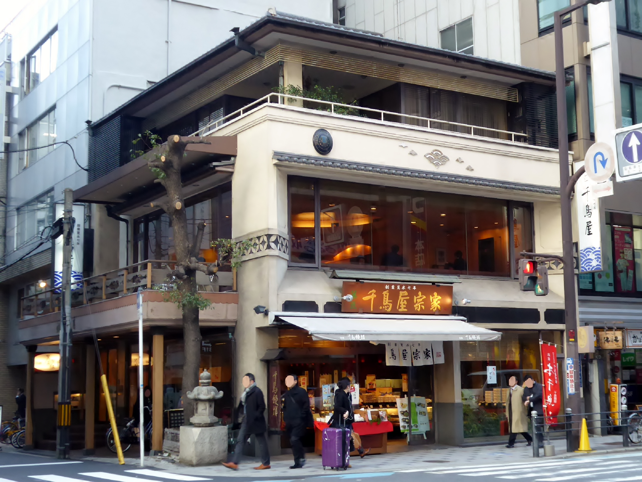 千鳥屋宗家本店を撮影。